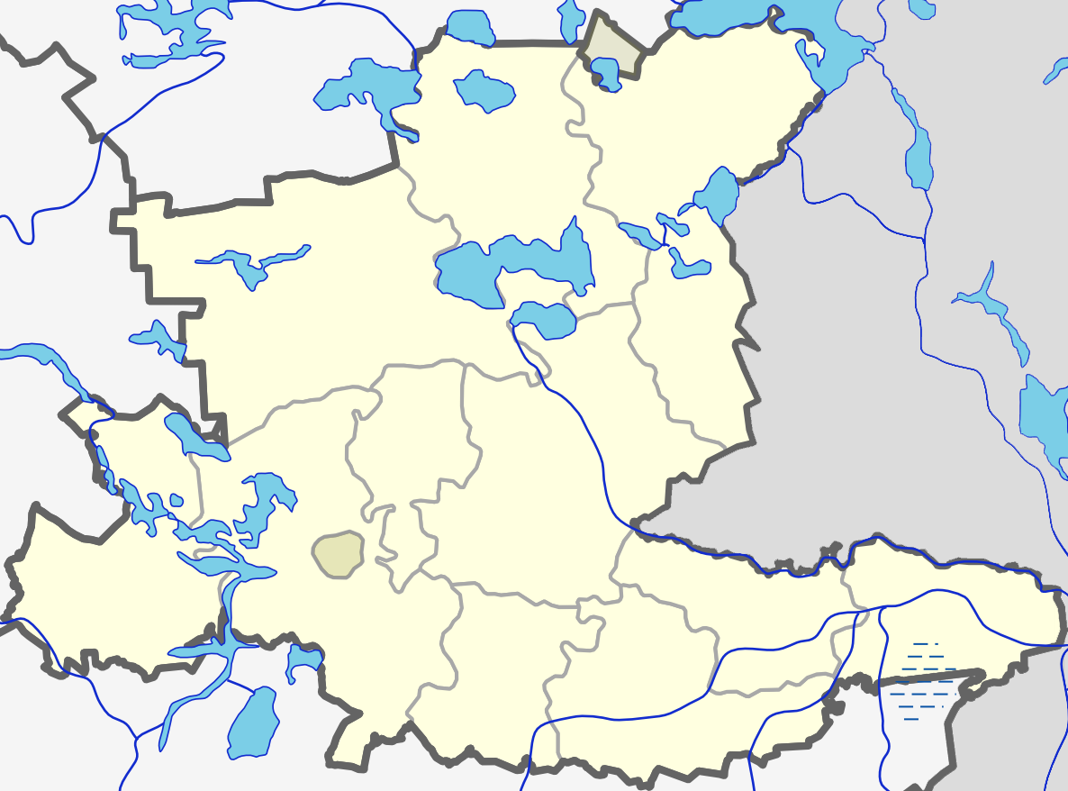 Ignalinos rajono žemėlapis